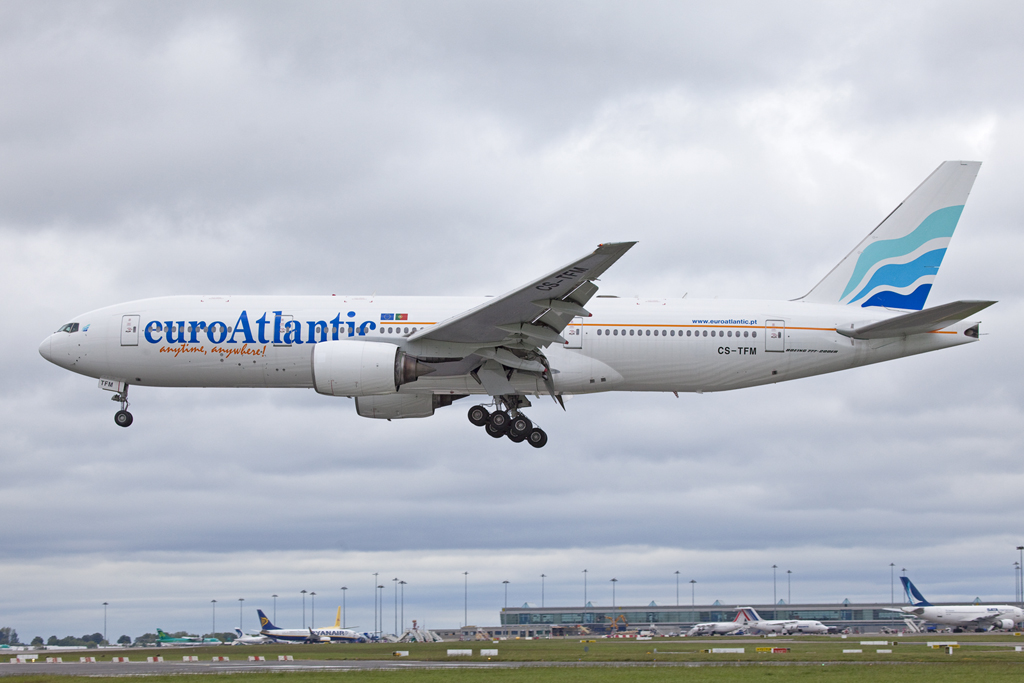 Dublin